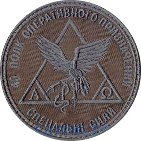 Нарукавний знак, 45-й полк оперативного призначення